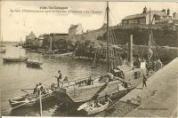 Vapeur "la Louise", premier courrier public assurant la liaison avec les îles de molène et ouessant.